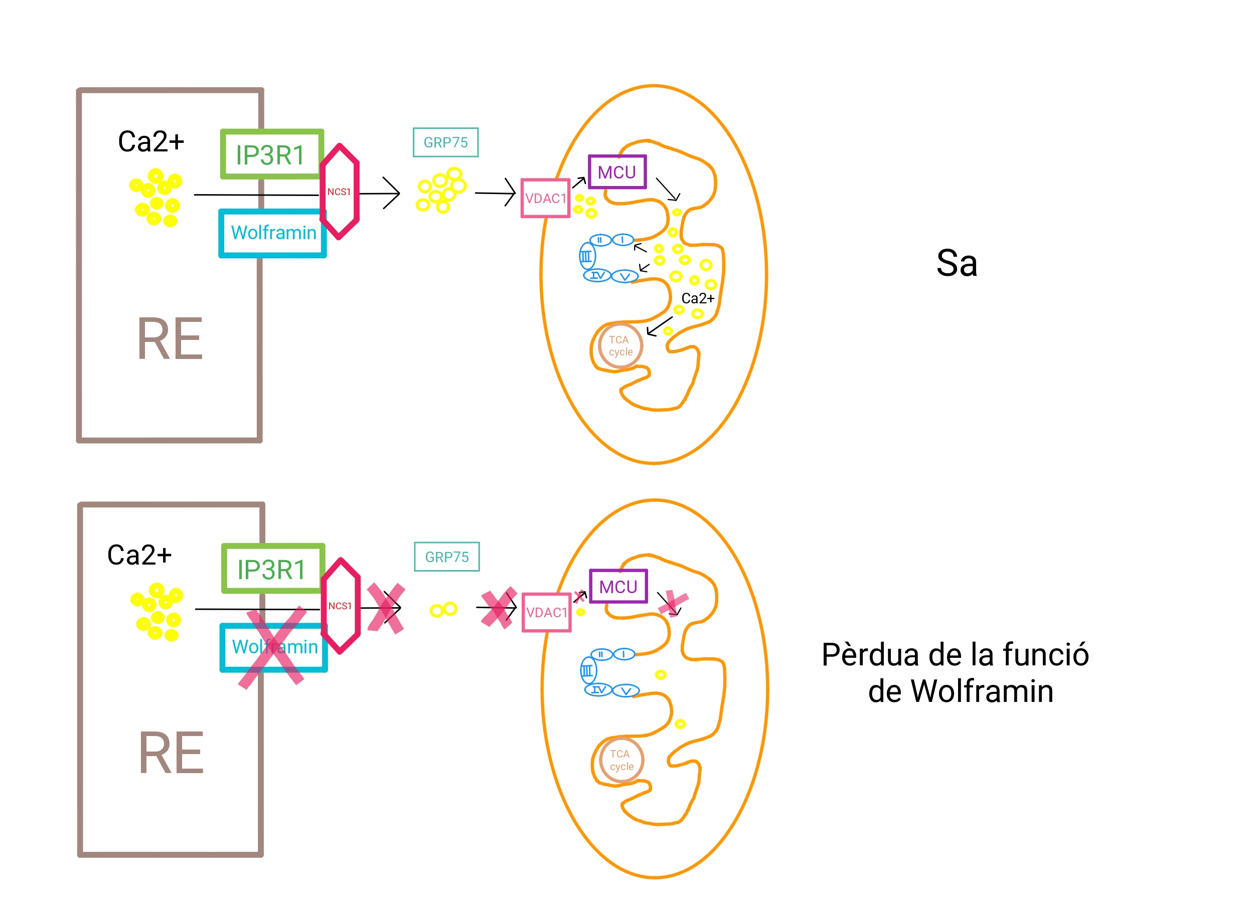 Pèrdua de la capacitat de transfèrencia de Ca2+ entre el RE i el mitocondri